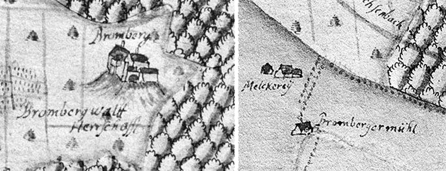 Ausschnitte aus der Kieserschen Forstkarte Nr. 98: Burg Bromberg mit Bromberger Wald. Melkerei und Bromberger Mühle mit Steg.